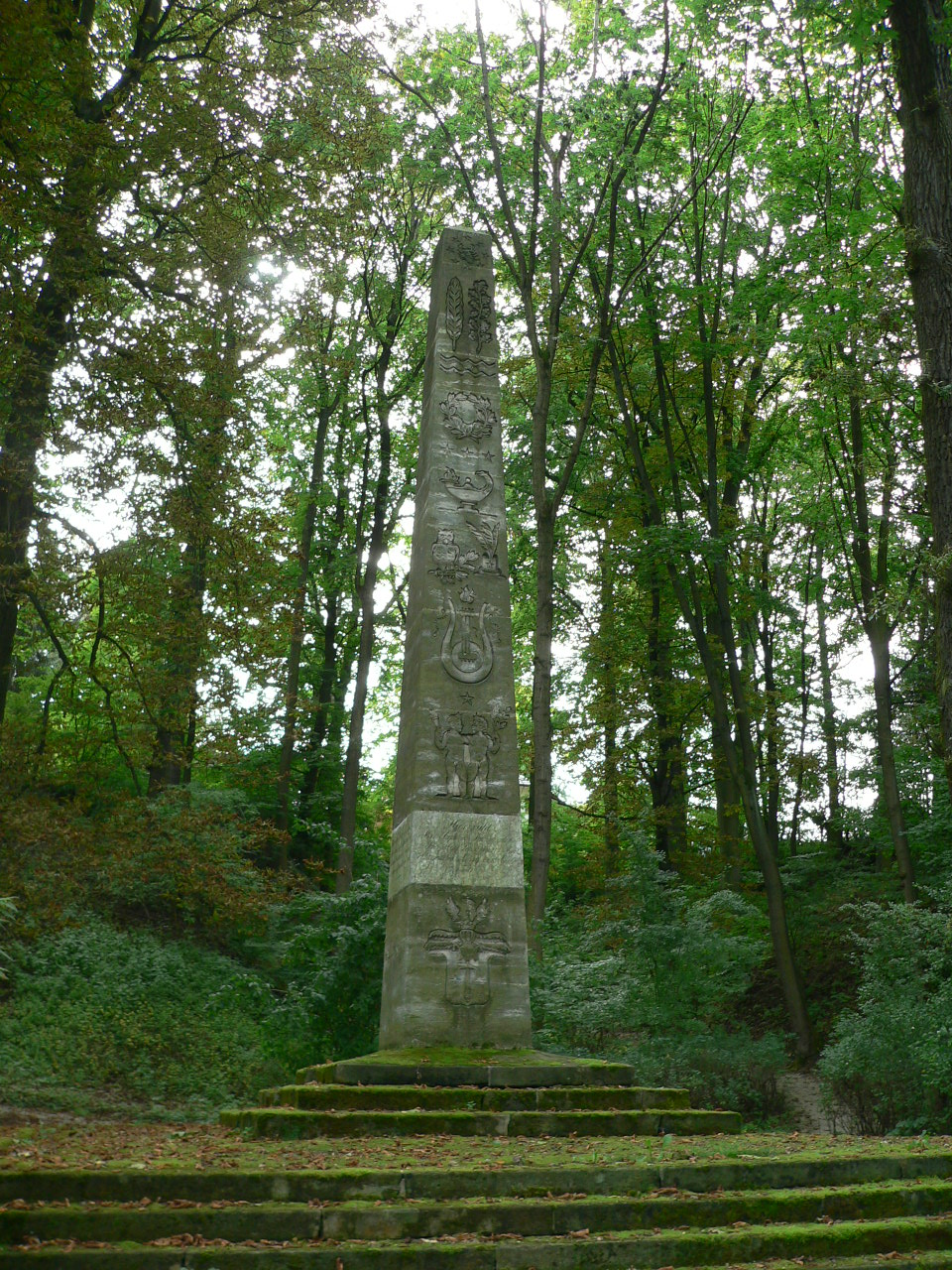 Denkmal des Dichters Moritz August von Thümmel in Coburg-Neuses